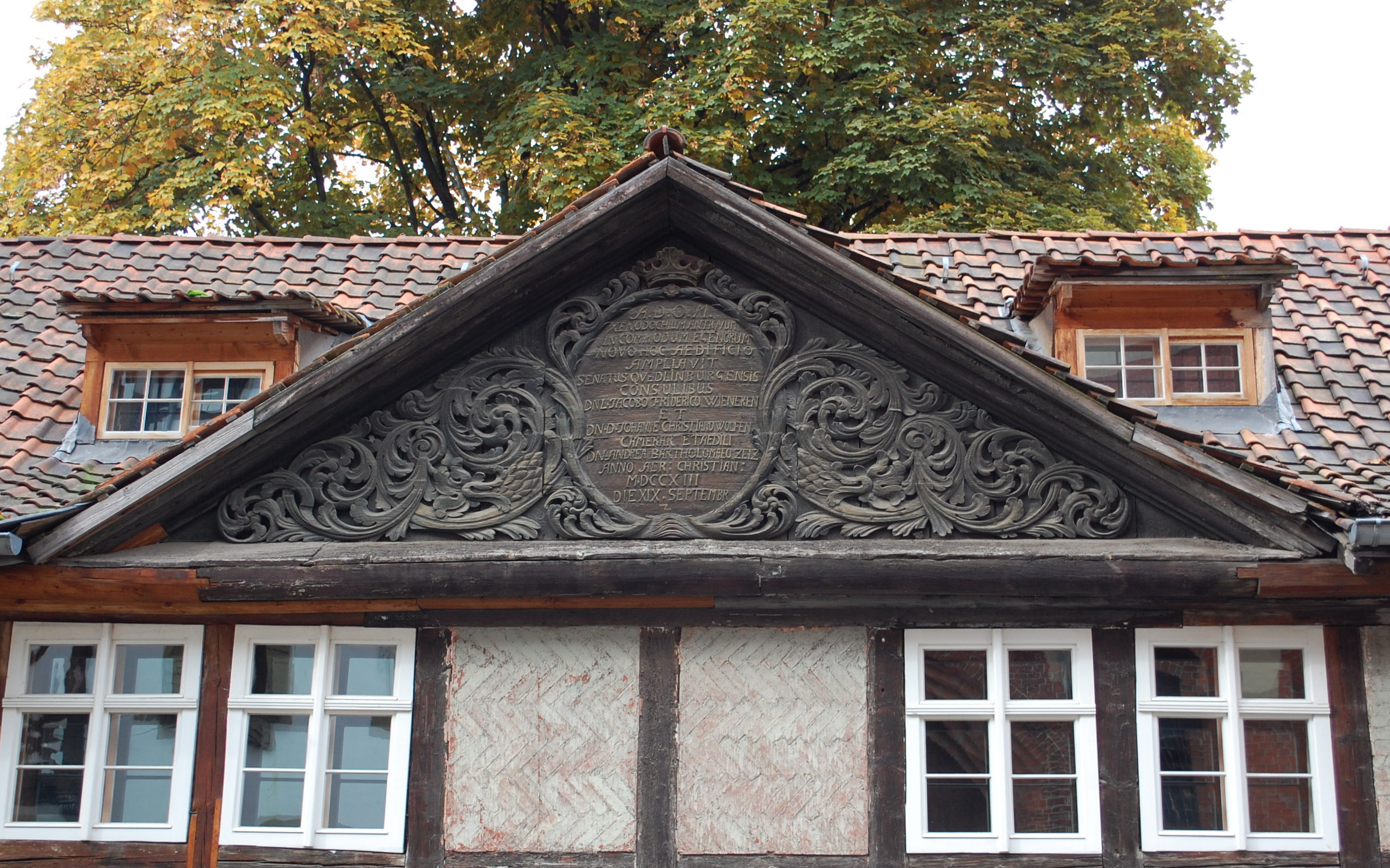 Giebel am Haus Hospital 1 in Quedlinburg